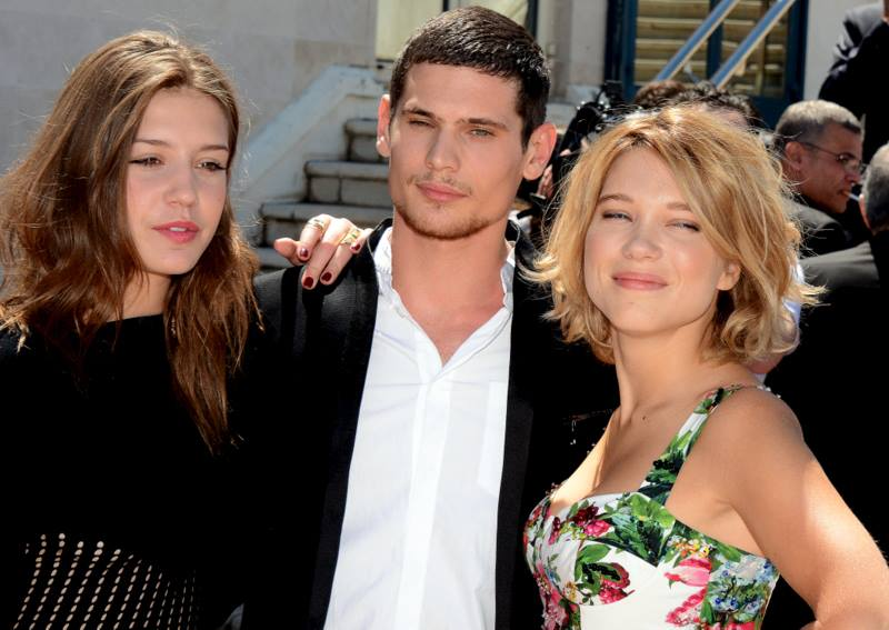 Adèle Exarchopoulos, Jérémie Laheurte et Léa Seydoux, lors de la présentation de La Vie d'Adèle au festival de Cannes. A droite, en arrière-plan, on peut apercevoir le réalisateur du film, Abdellatif Kechiche.